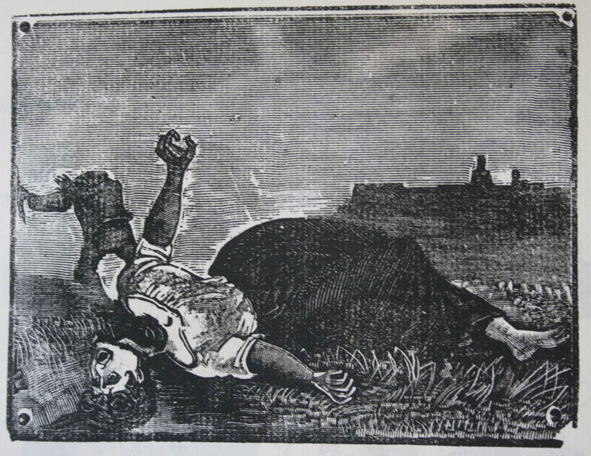 Grabado de José Guadalupe Posada que muestra a una de las víctimas de Francisco Guerrero.